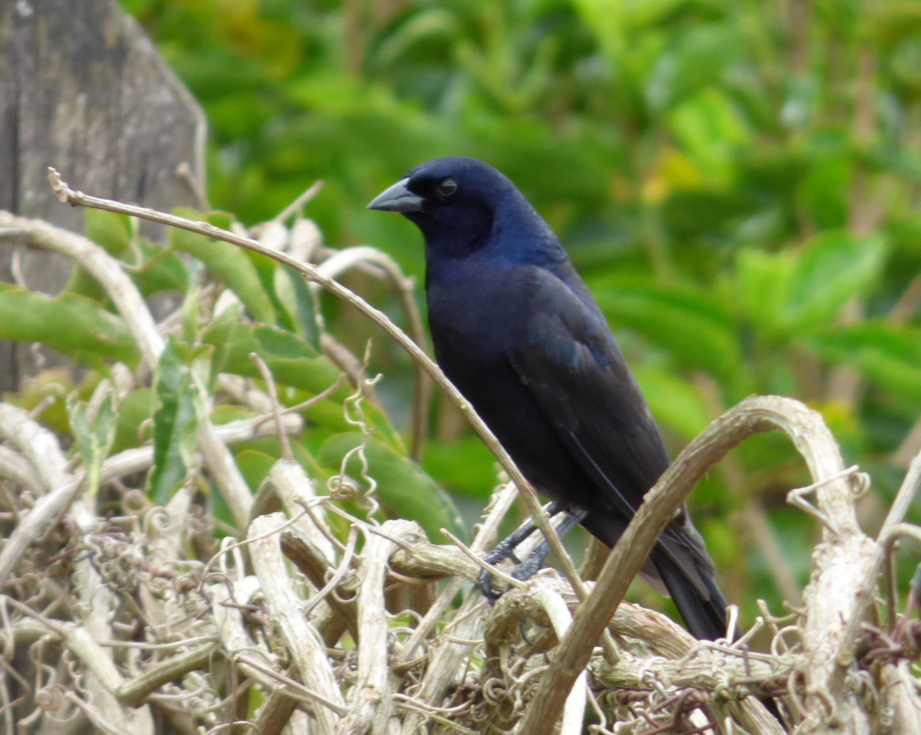 Molotrhus bonariensis (Chamón parásito) - Macho